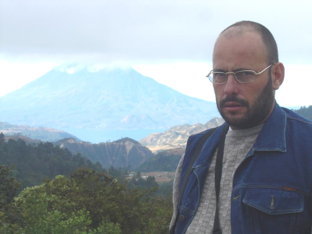 Alberto Sicilia Martínez, promotor cultural y poeta cubano